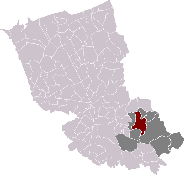 Locatie gemeente Meteren in arrondissement Duinkerke. Zelfgemaakt. Location of Méteren municipality in the arrondissement of Dunkirk. Self made. Localisation de la commune de Méteren dans l'arrondissement de Dunkerque. Fait moi-même.